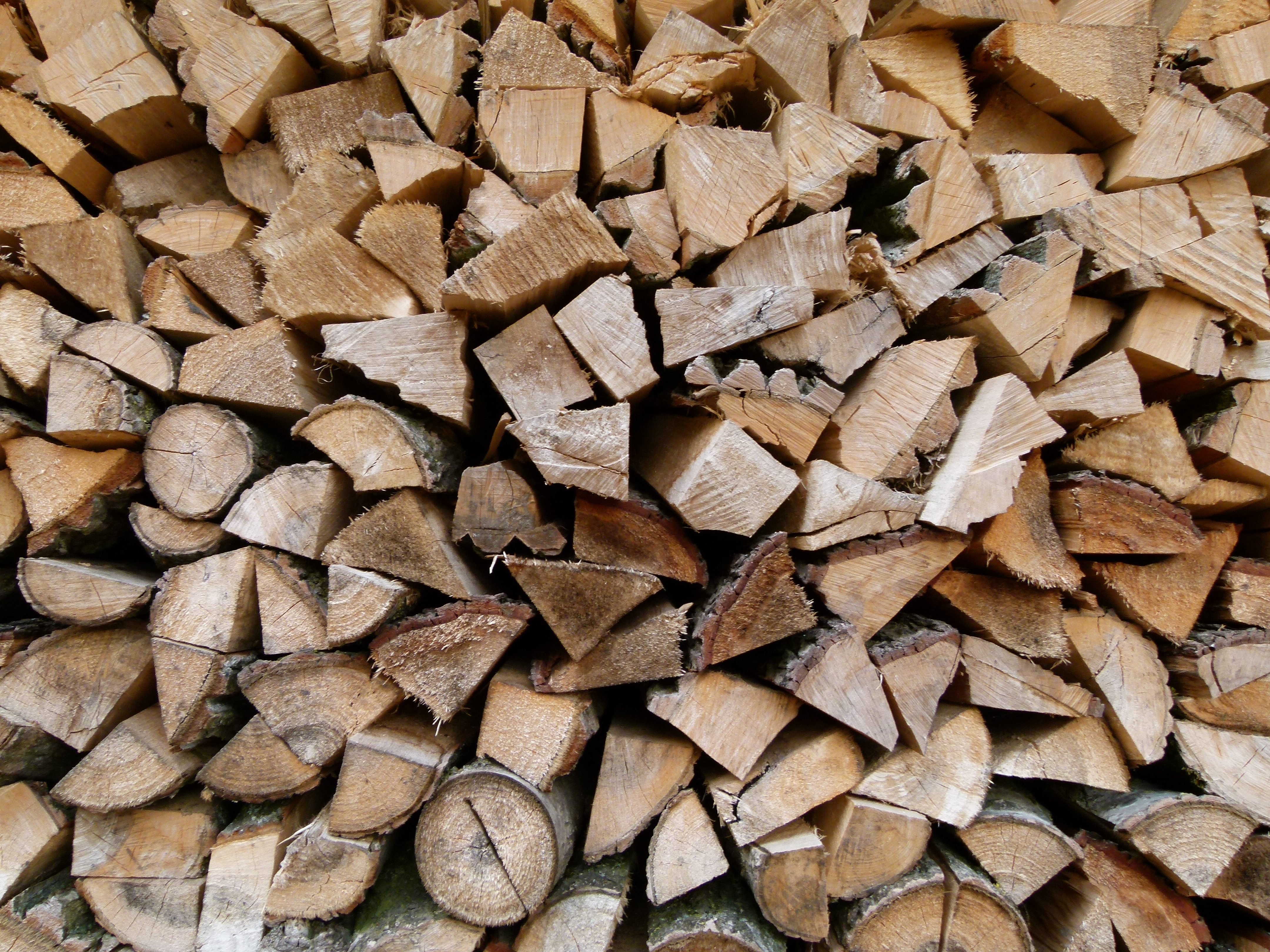 Bois coupé dans le hangar